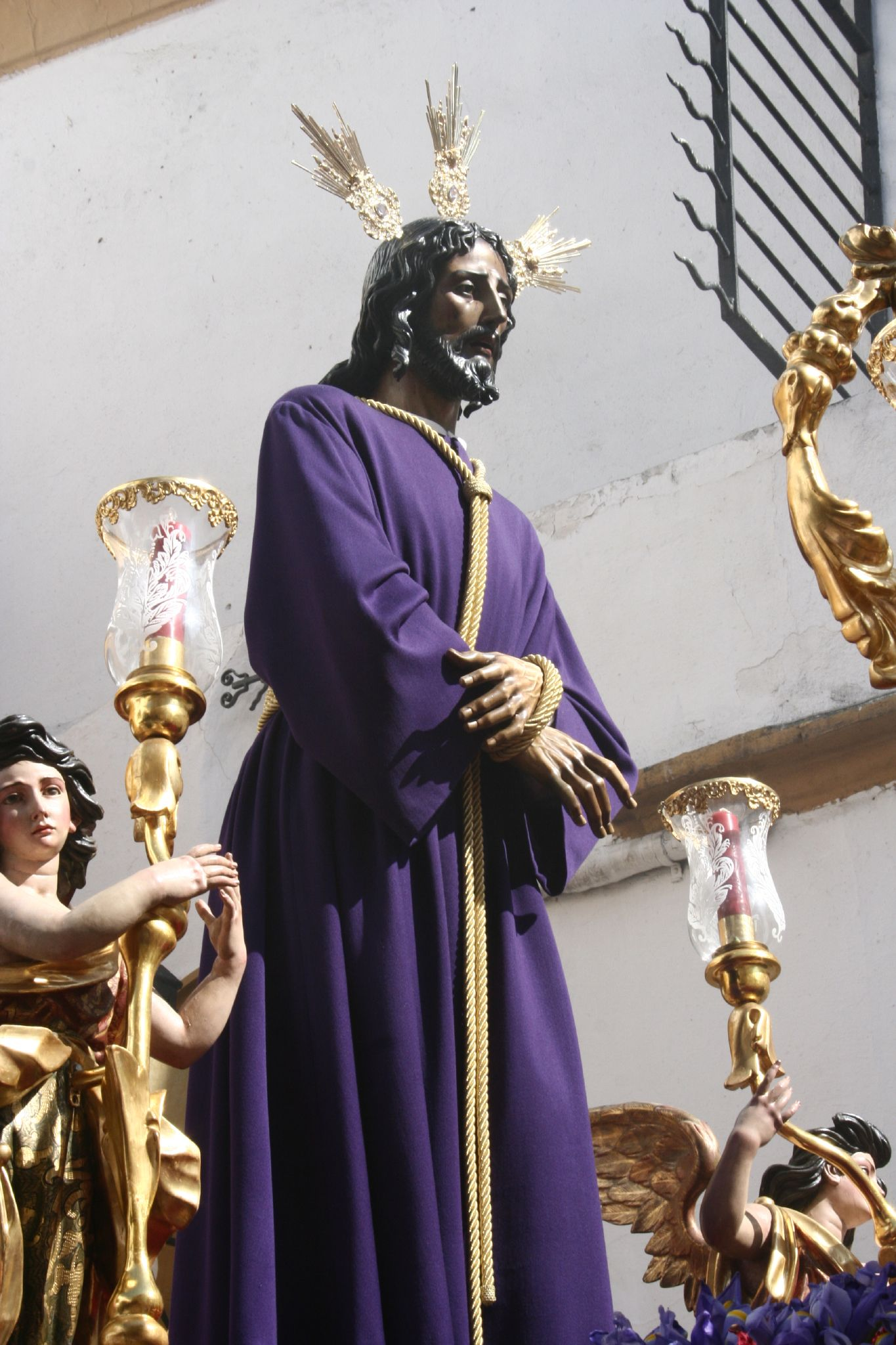 Jesús Cautivo. Semana Santa en Sevilla. Año 2006 Foto realizada y propiedad de Ángel Cachón